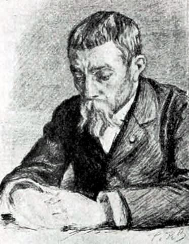 "M. Ch. Girault".